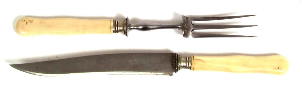 Forskjærbestikk i stål med skaft av ben. Foto Anne-Lise Reinsfeldt / Norsk Folkemuseum, NF.1947-0506AB.